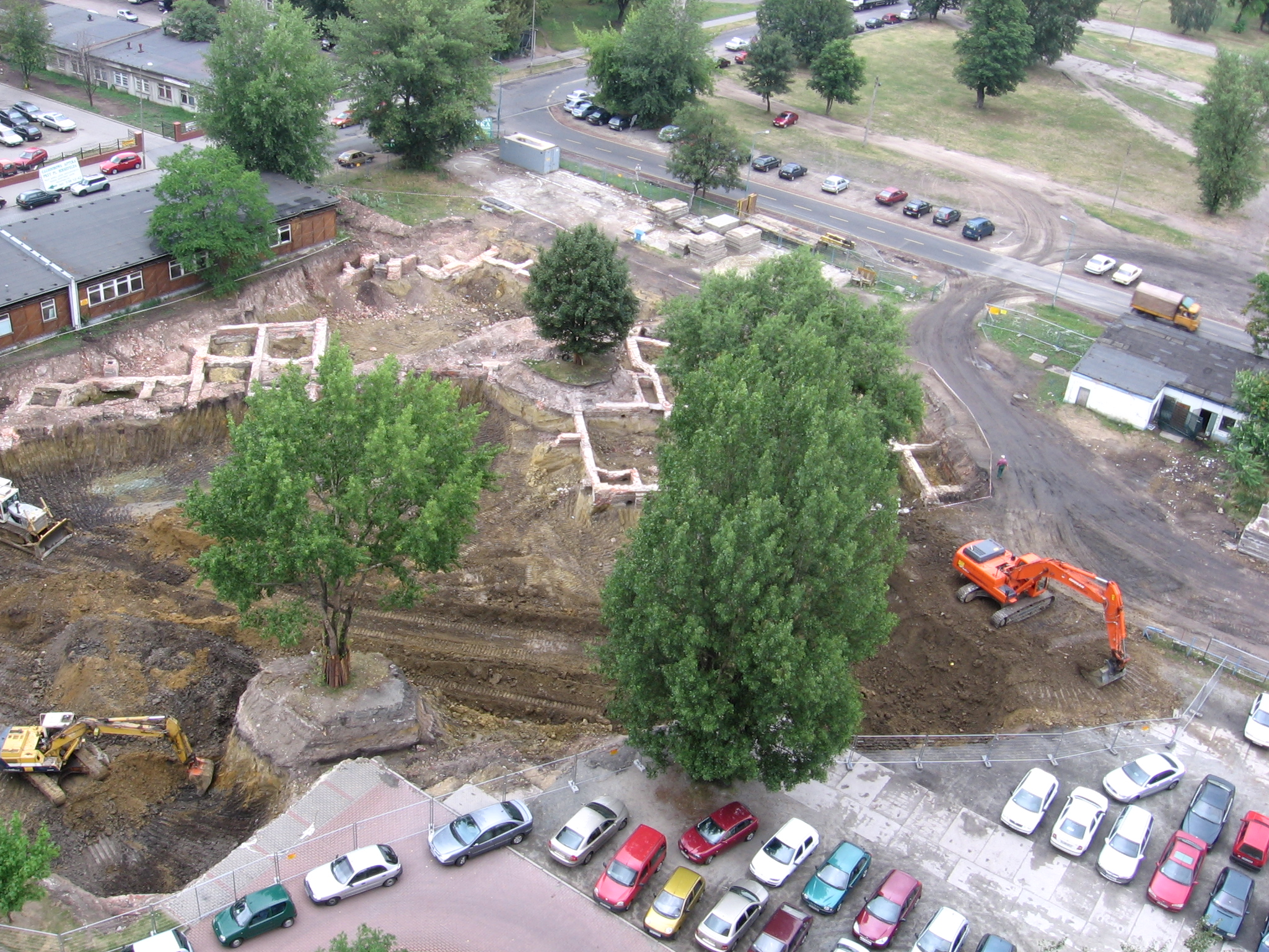 Lato 2006: roboty ziemne przed rozpoczęciem budowy Sky Tower we Wrocławiu, widok z XII piętra Poltegor Centre przed jego zburzeniem. Widoczny zarys początkowego odcinka zlikwidowanej 40 lat wcześniej ul. Kruczej. Po prawej widoczna ulica Szczęśliwa, po lewej brązowe baraki przy ul. Gwiaździstej (kilka tygodni po wykonaniu zdjęcia - zlikwidowane). W górnym lewym rogu zdjęcia inne baraki (popielate), przy Szczęśliwej, zlikwidowane dwa lata później.